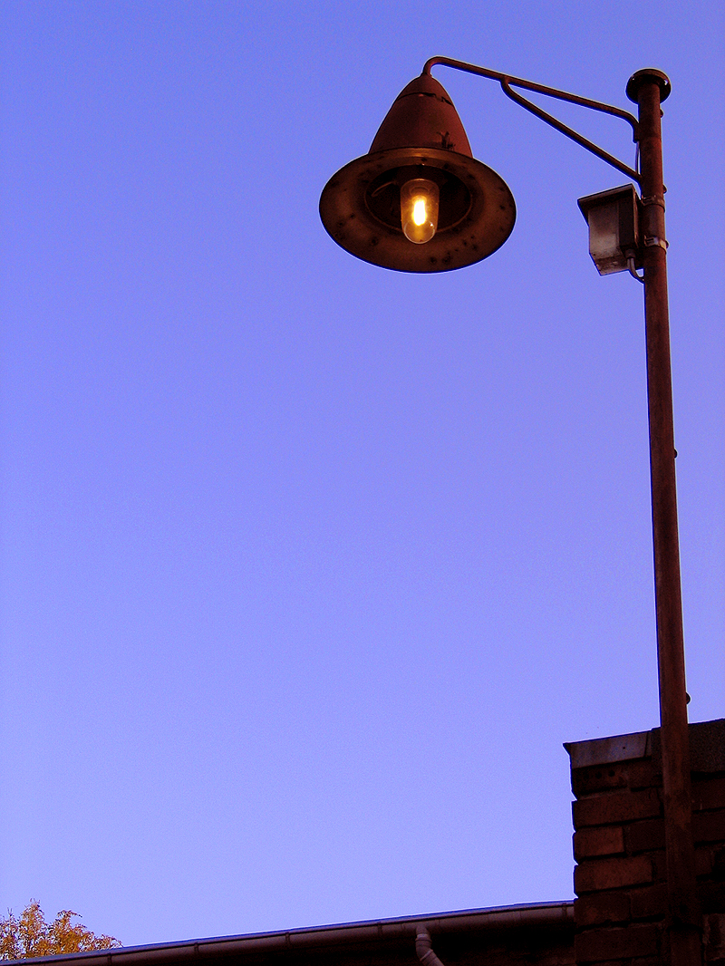 Eingeschaltete Beleuchtung mit Dämmerungsschalter im Hof der ehemaligen Fuchswerke in Hannover (ADMI, Brüder Fuchs) ...